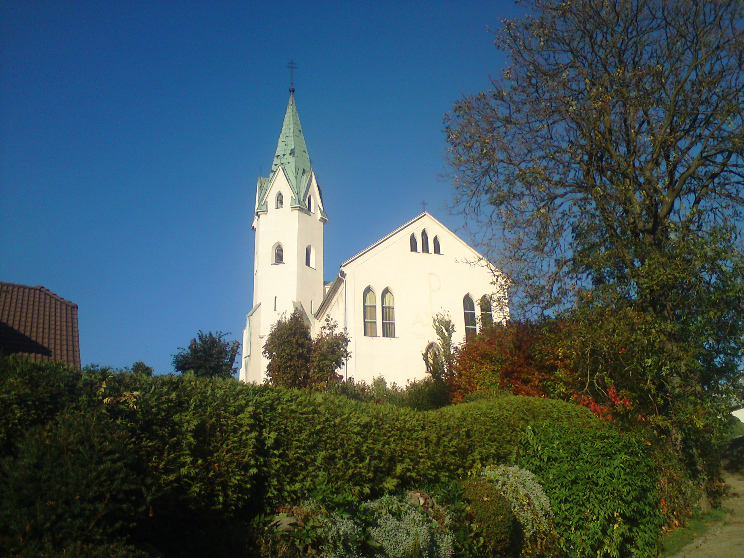 KOSTOL